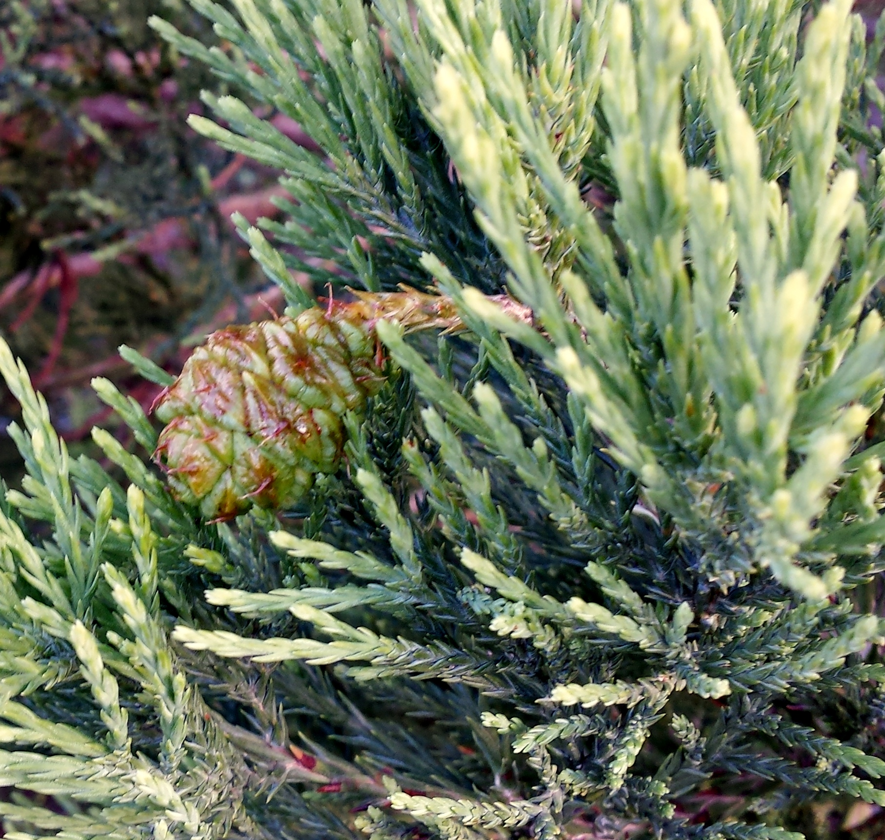 Pinya en formació d'una Sequoia